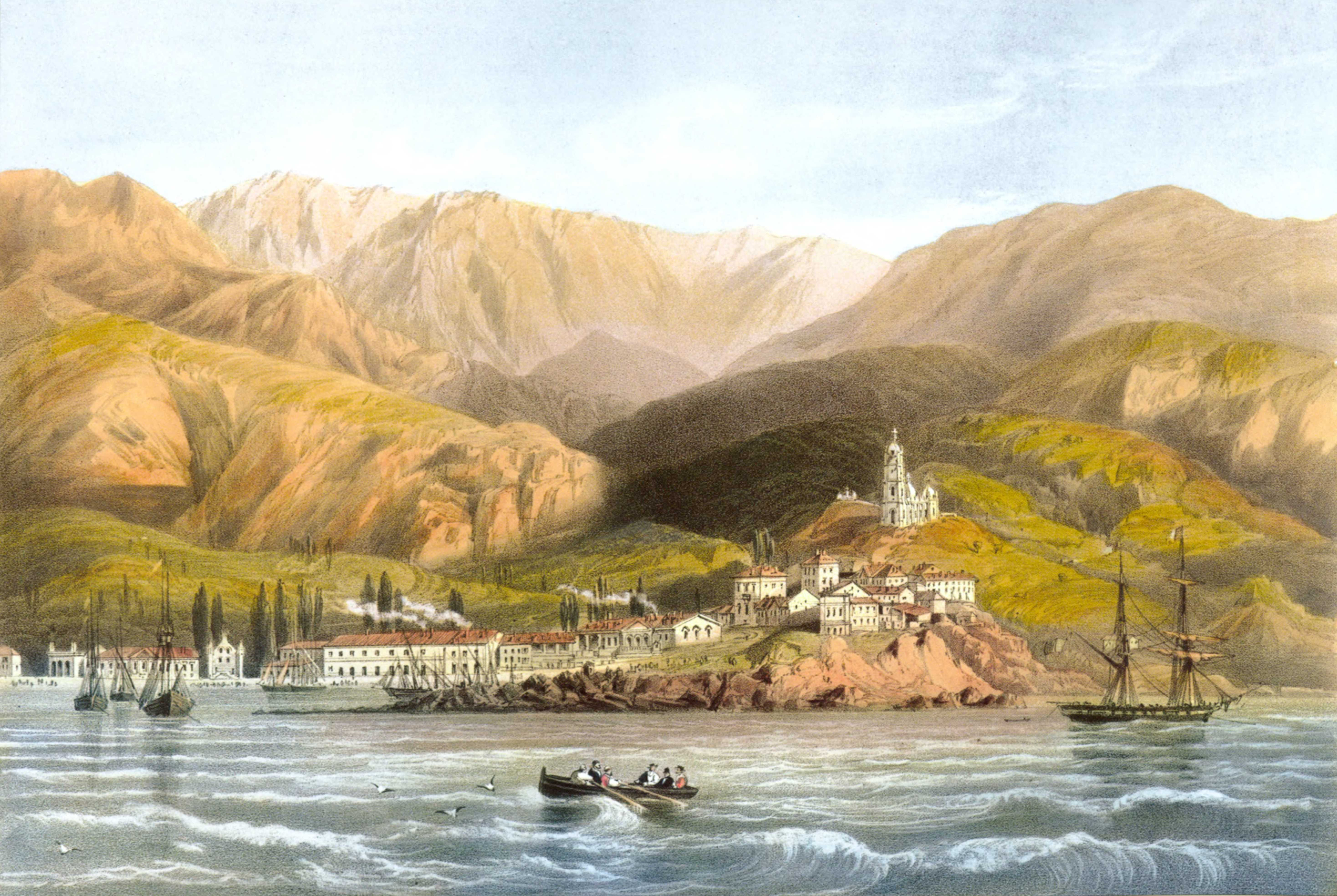 Карло Боссоли. Вид Ялты